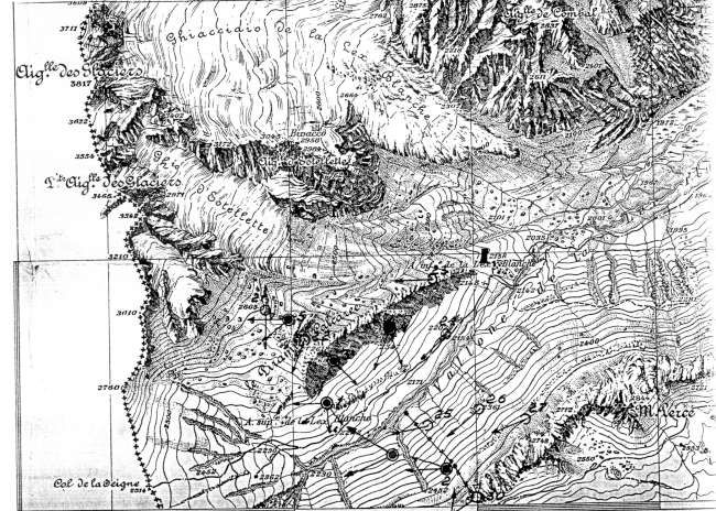 dettaglio della sistemazione difensiva del Sottosettore X/b (genio militare)